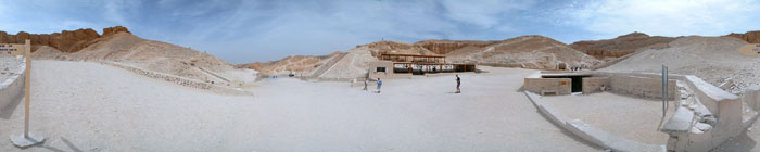 Dolina kraljev